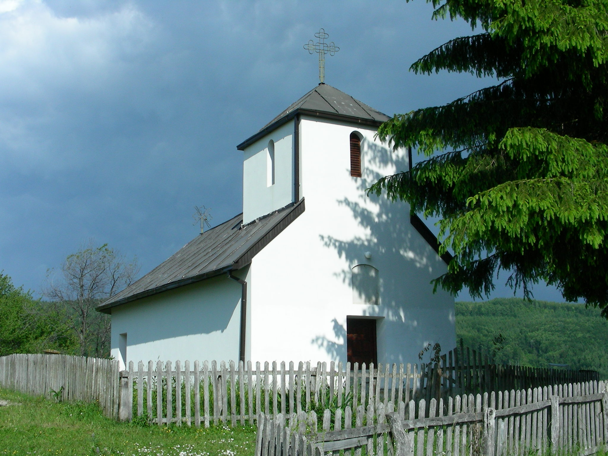 Crkva Preobraženja Gospodnjeg u Bratljevu (opština Ivanjica)